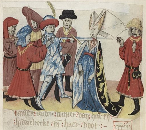 Poprava bavorské vévodkyně Marie Brabantské